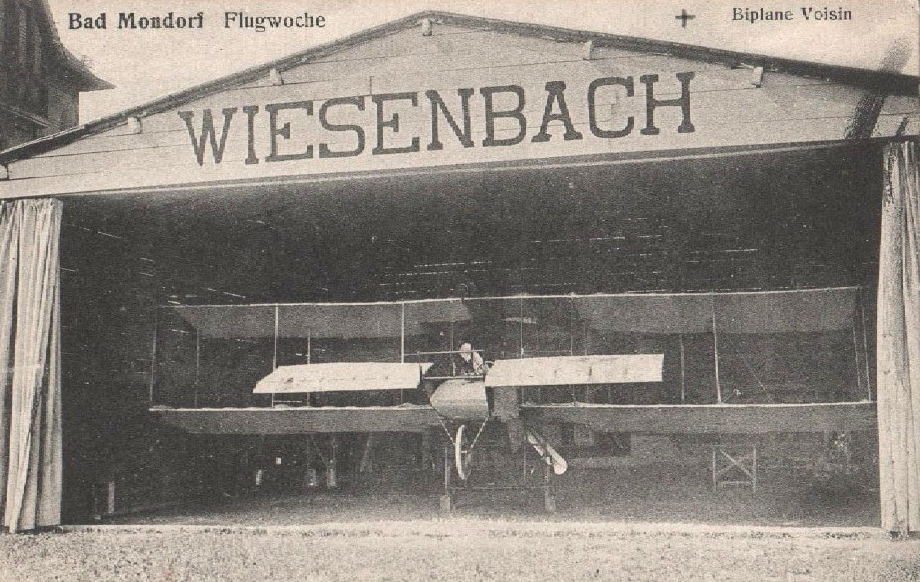 De Bridder Wiesenbach hiren Avion am Hangar op der Semaine d'aviation de Mondorf am Juni 1910, Postkaart vum J.M. Bellwald.